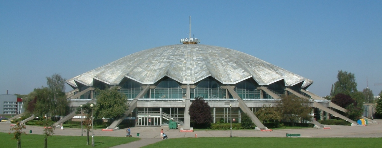 Hala widowiskowo-sportowa "Arena" in Poznań